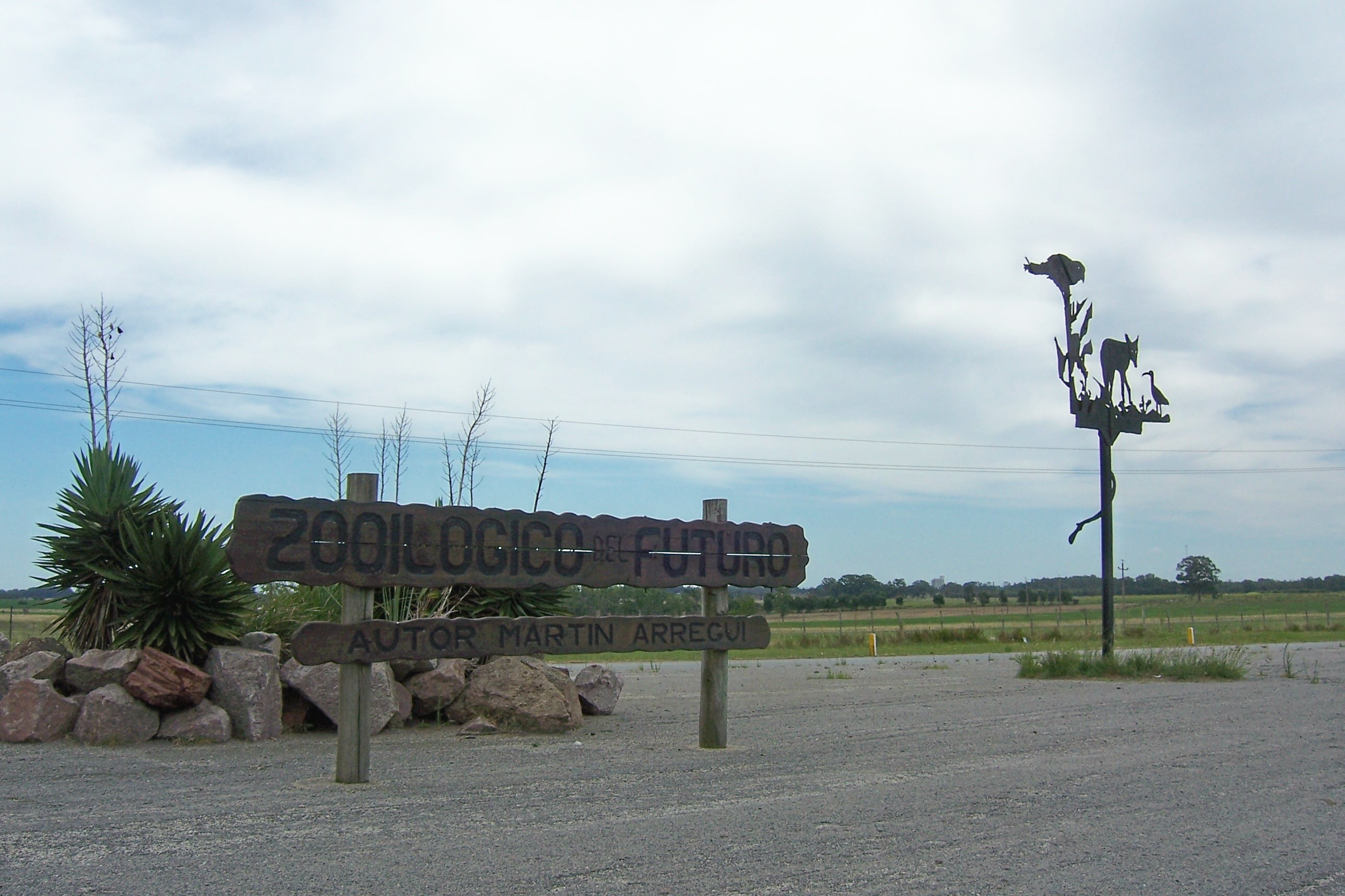 Zooilógico del futuro, grupo escultórico de Martín Arregui, cercano a la ciudad de Trinidad, Uruguay.